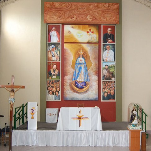 Parrochia Virgen de Caacupe di berazategui Altare nel Salone, che si usa nelle feste. Si guarda il polittico